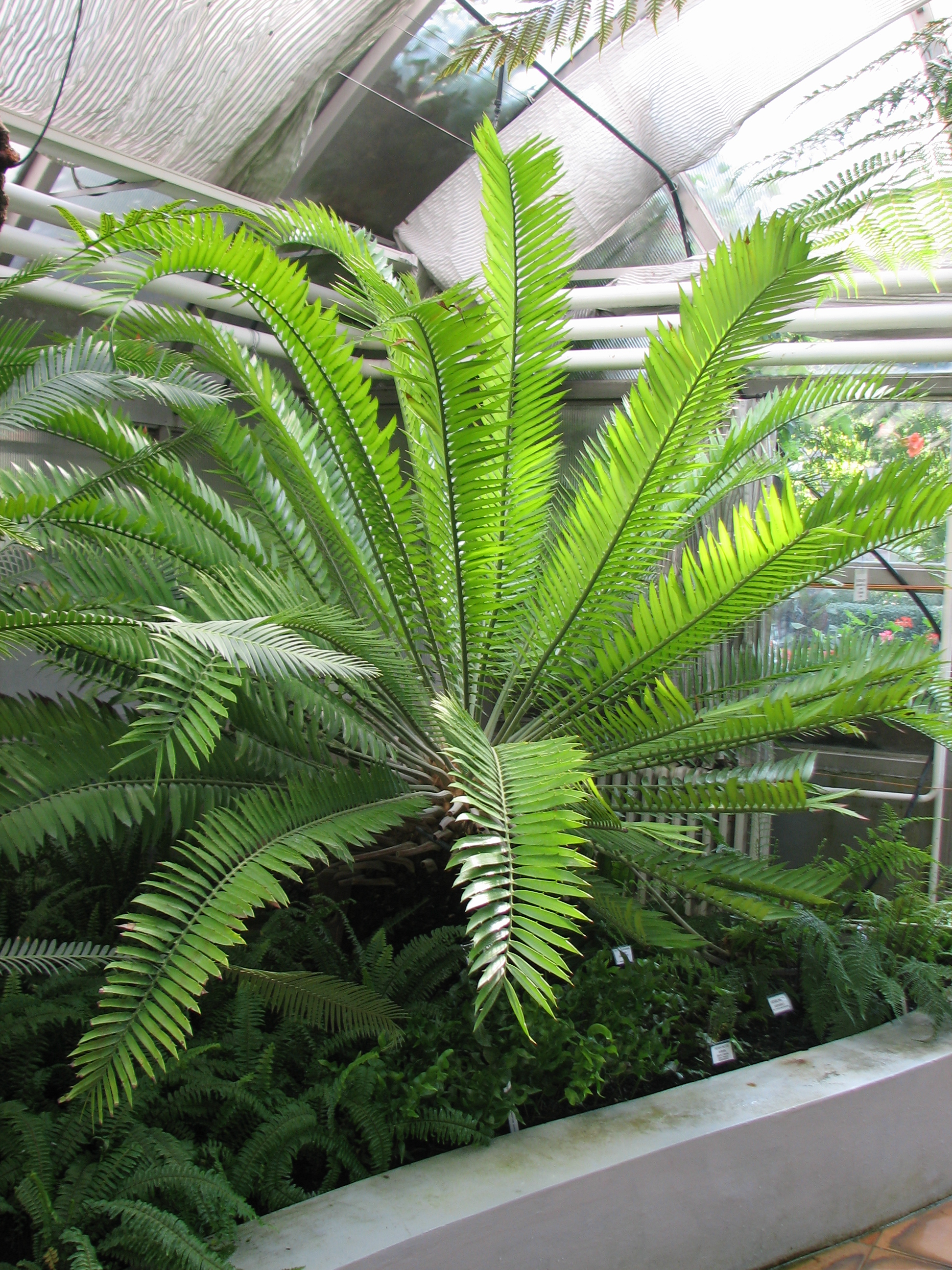 Encephalartos hildebrandtii A.Braun & Bouché (Botanická zahrada PřF MU)